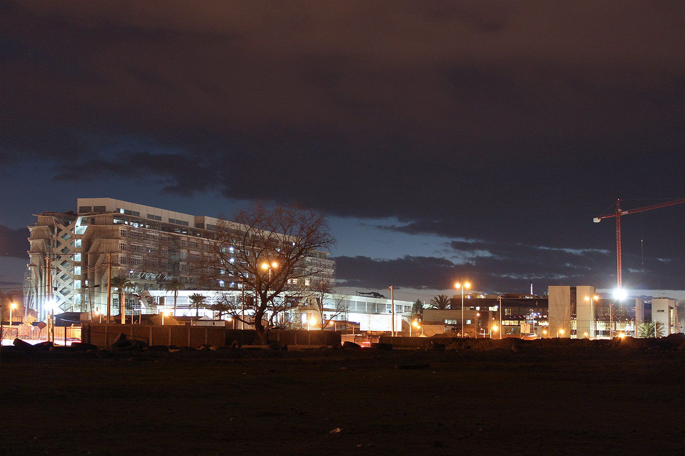 vista posterior del hospital de talca